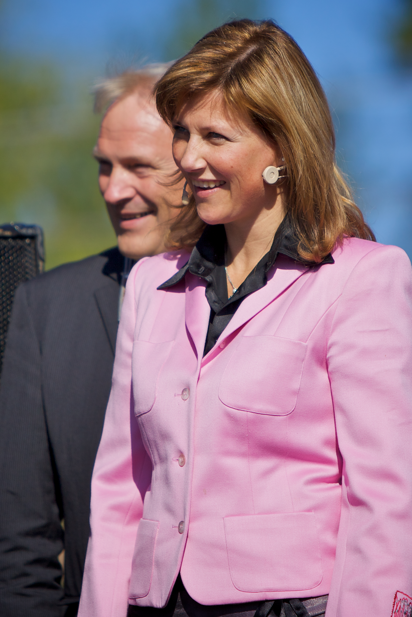 Märta Louise på Eplefesten i Gvarv